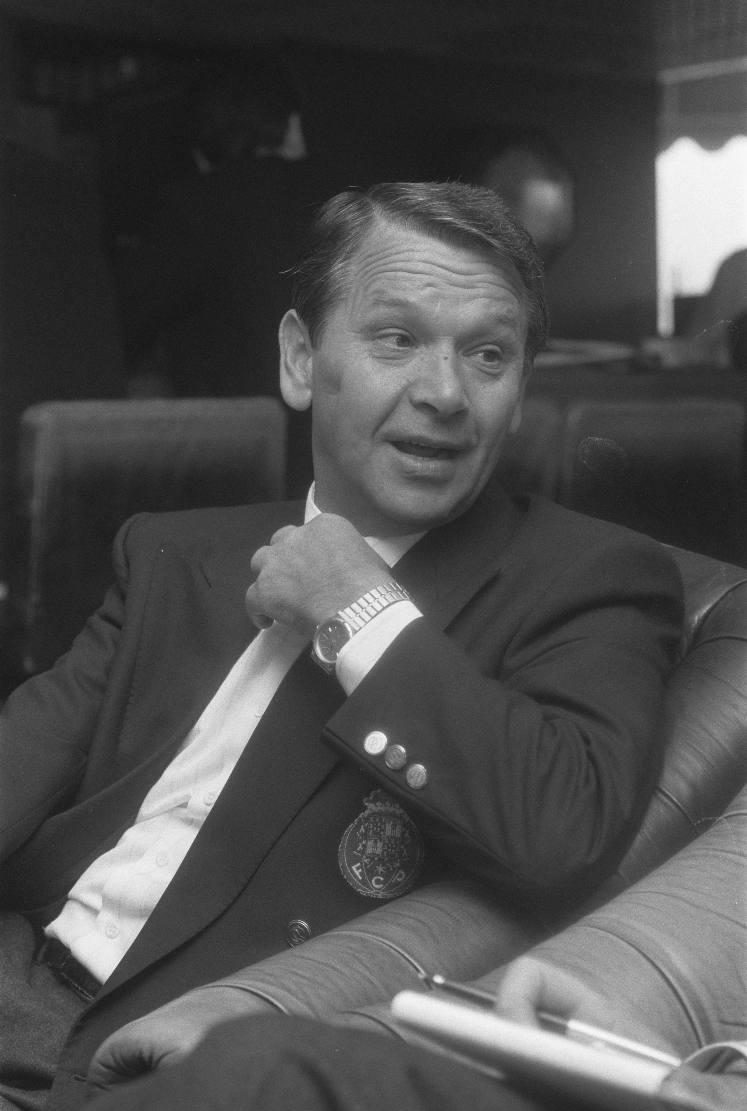 Collectie / Archief : Fotocollectie Anefo Reportage / Serie : [ onbekend ] Beschrijving : FC Porto (in verband met wedstrijd om Super Cup tegen Ajax); trainer Ivic Datum : 23 november 1987 Trefwoorden : sport, trainers, voetbal Persoonsnaam : Fc Porto, Ivic Instellingsnaam : AJAX Fotograaf : Molendijk, Bart / Anefo Auteursrechthebbende : Nationaal Archief Materiaalsoort : Negatief (zwart/wit) Nummer archiefinventaris : bekijk toegang 2.24.01.05 Bestanddeelnummer : 934-1341